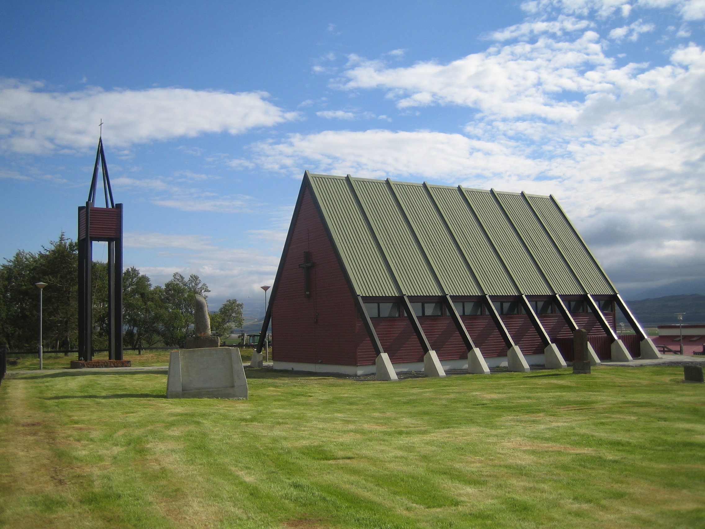 Kirkjan á Miklabæ